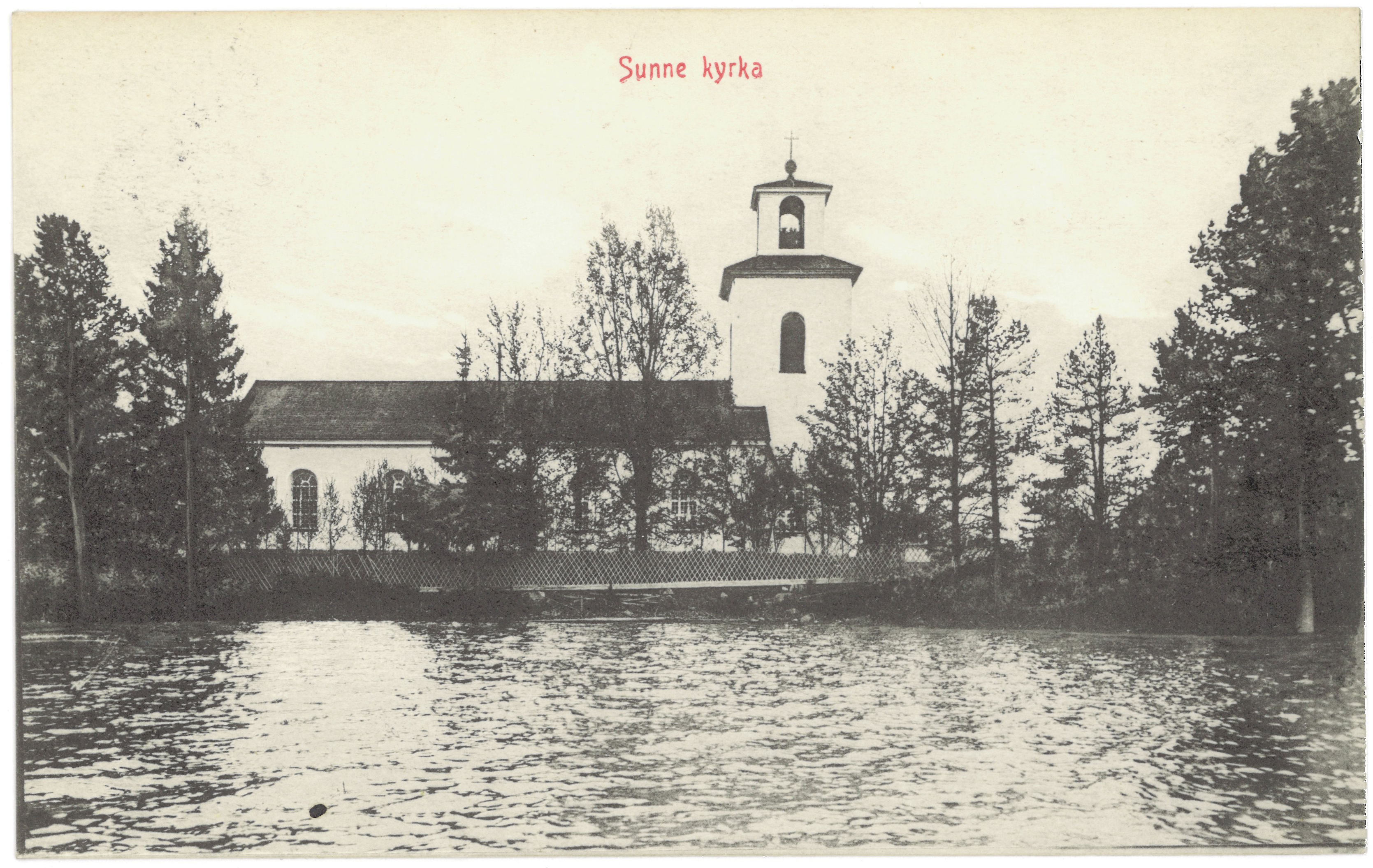 Vykort av Sunne kyrka i Jämtland, poststämplat i Östersund 23 december 1914. Utgivet av Missionsbokhandeln, Östersund.